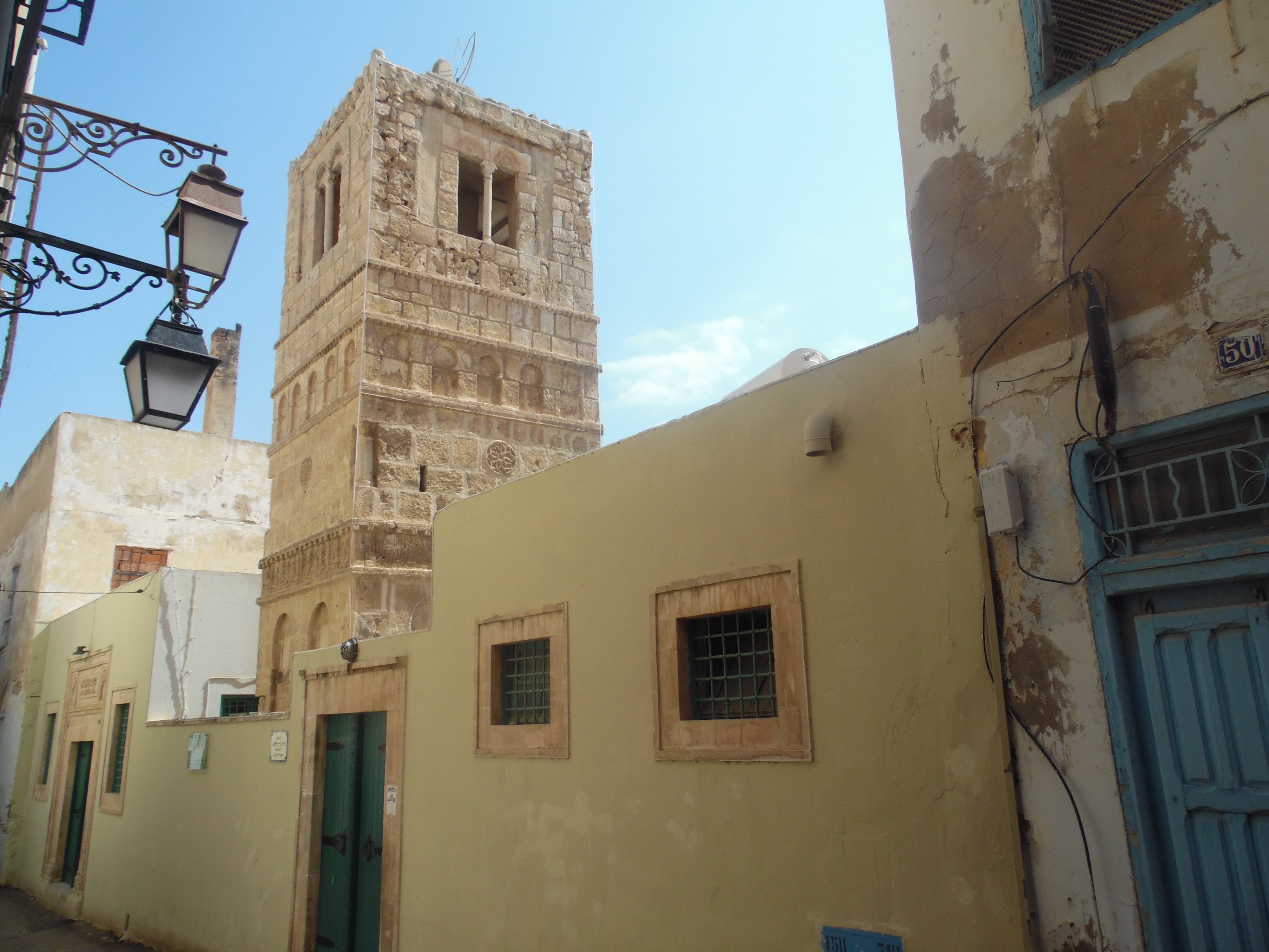 Mosquée de Sidi-Amor